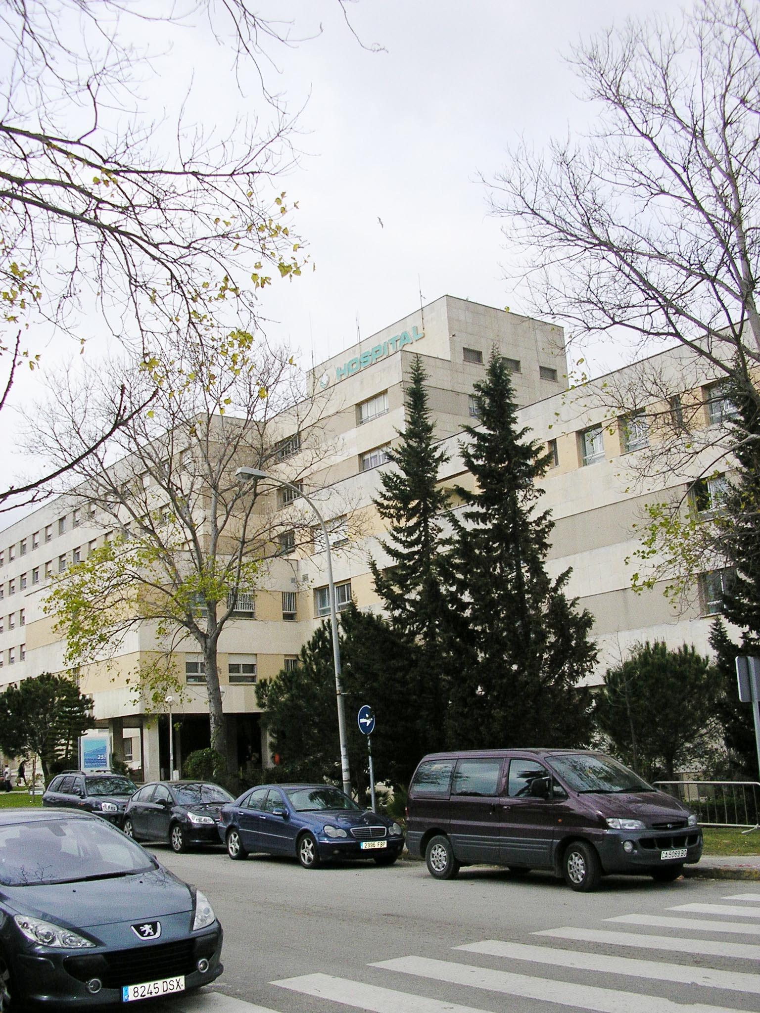 Hospital Punta de Europa en Algeciras, Andalucía, España